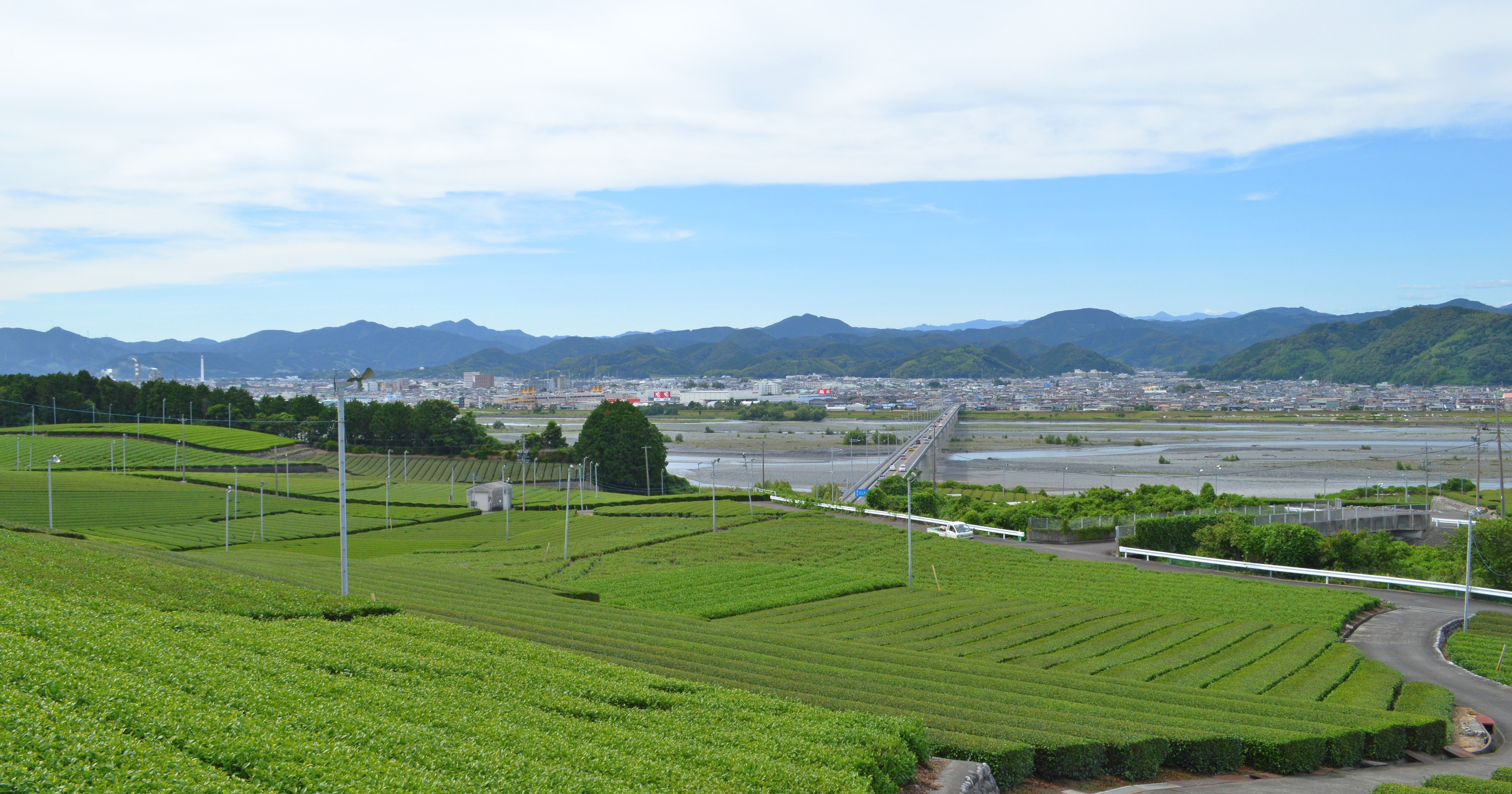 牧之原台地から望む島田市街地